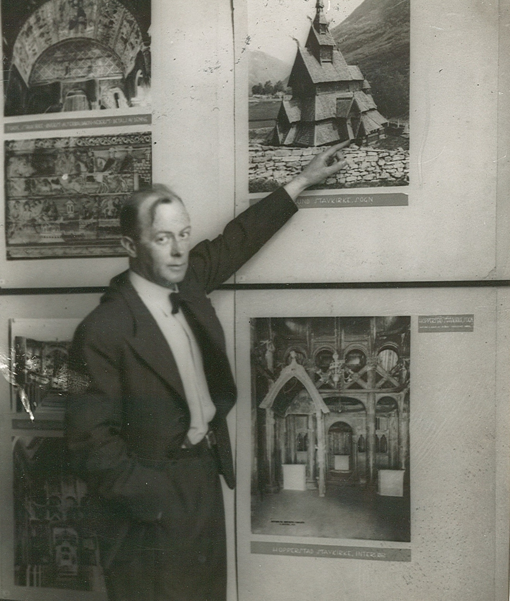 Arne Nygård-Nilssen, portrett, mann, kunsthistoriker, riksantikvar, stående halvfigur, plakater.